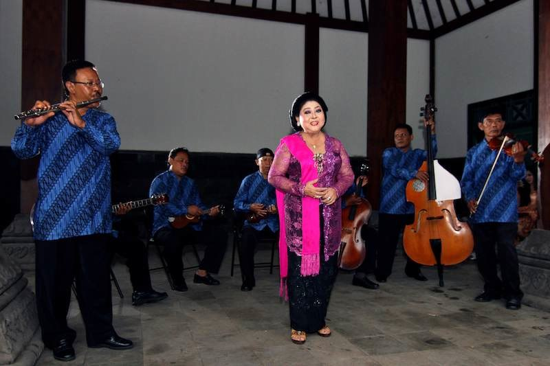 Waldjinah is een van de grootste krontjongzangeressen uit Indonesië, de ‘Queen of keroncong’, de koningin van krontjong. Te gast op de 55e Tong Tong Fair in Den Haag, 22 mei t/m 2 juni 2013.